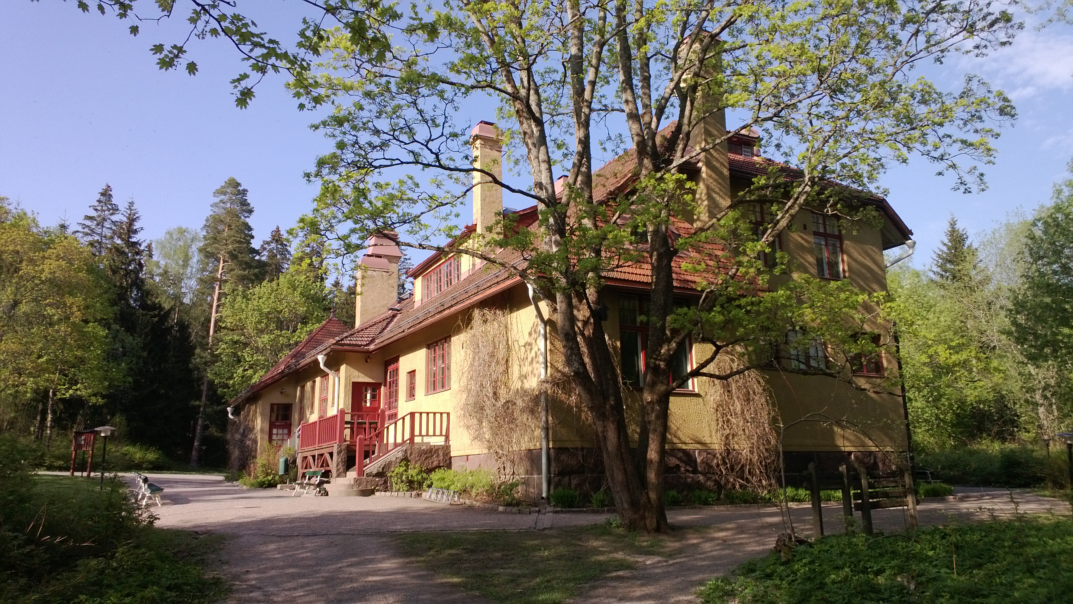 Luontotalo Villa Elfvik Espoossa.